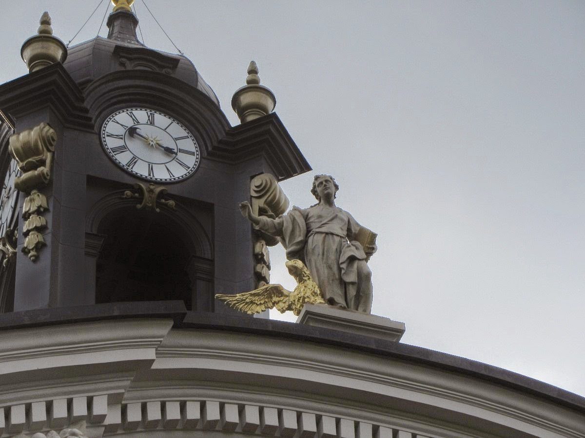 Краявіды Воўчына